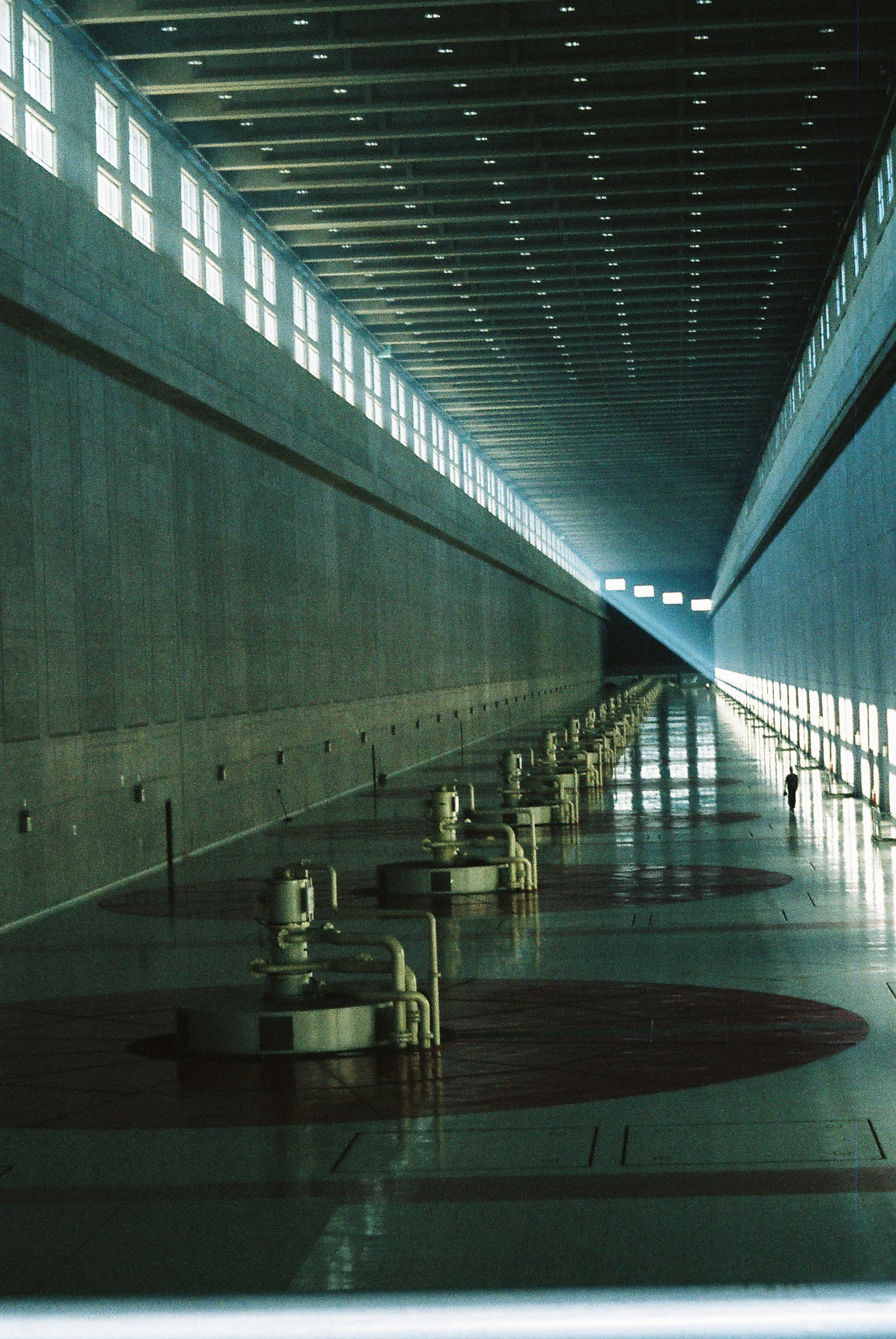 Fotografía del río Parana al paso de Ayolas.